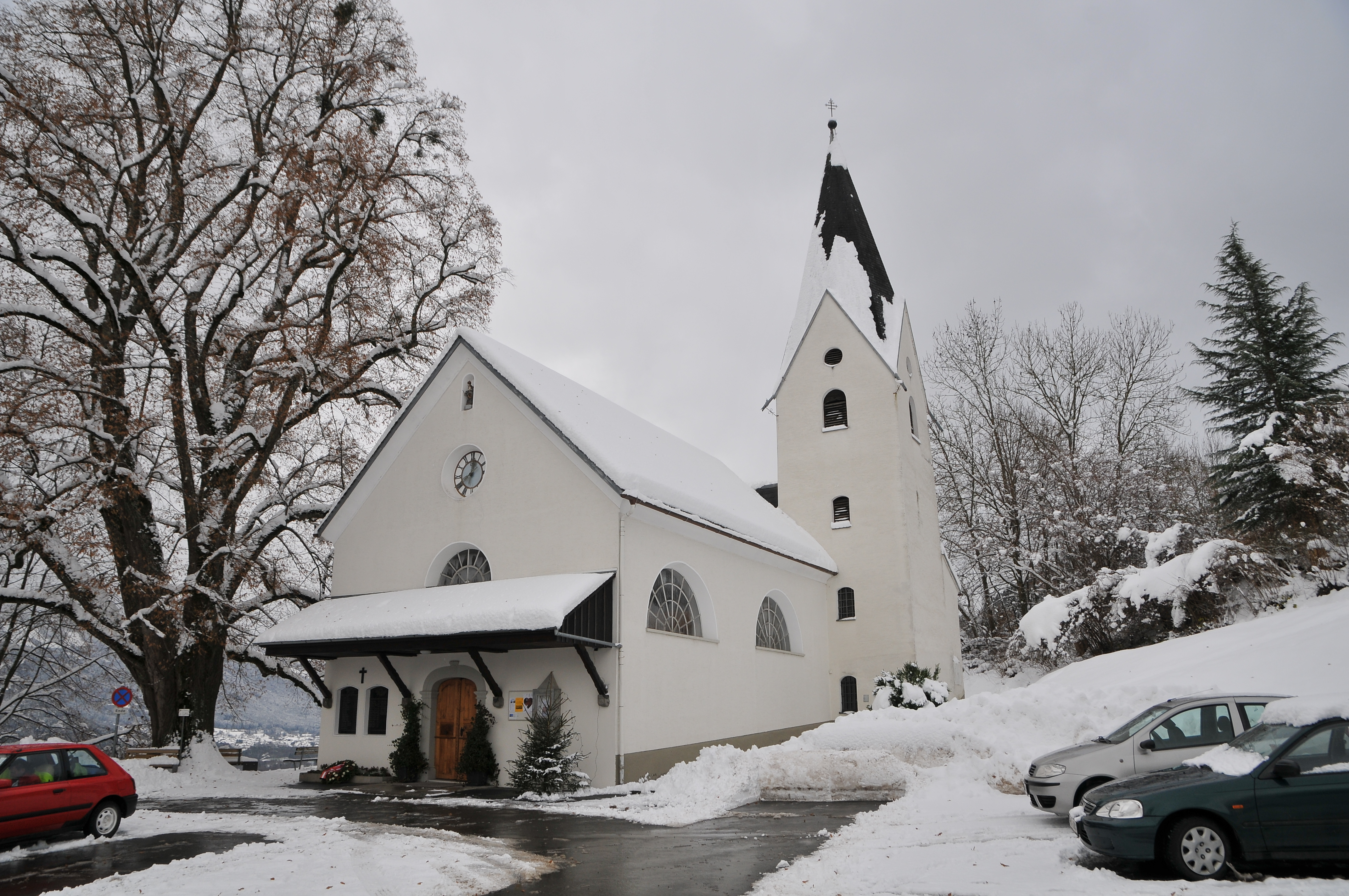 Kapelle Mariahilf/Maria Heimsuchung auf Maria Ebene in Fellengatter, Frastanz. Erbaut 1826. Im Giebelaufsatz des Hochaltares ist eine Figur Gottvater von Erasmus Kern um 1640.